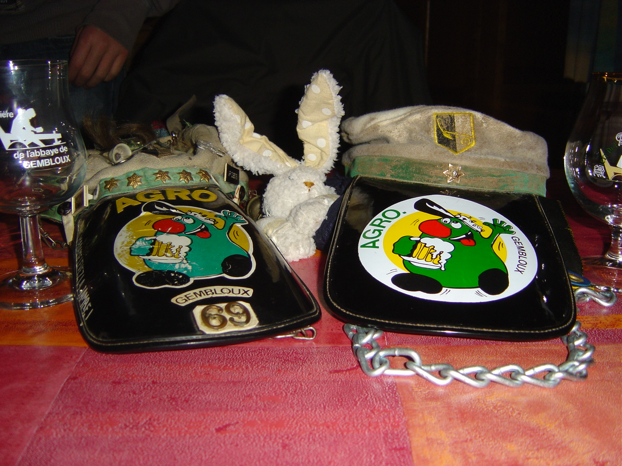 Penne Gembloutoises (1976 & 2009)